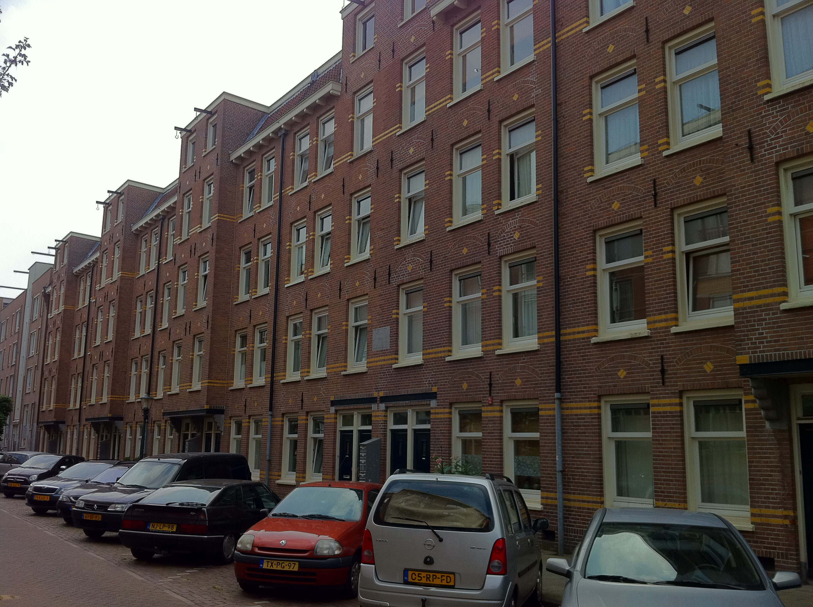 Amsterdam, Van Beuningenstraat. Rijksmonument, eerste woningwetwoningen Amsterdam